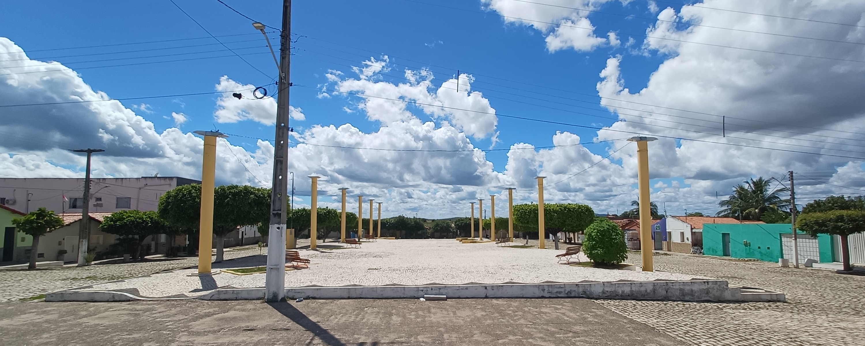 Praça de Eventos Jocelmo Segundo de Oliveira, no distrito de Major Felipe, em José da Penha, Rio Grande do Norte, Brasil.